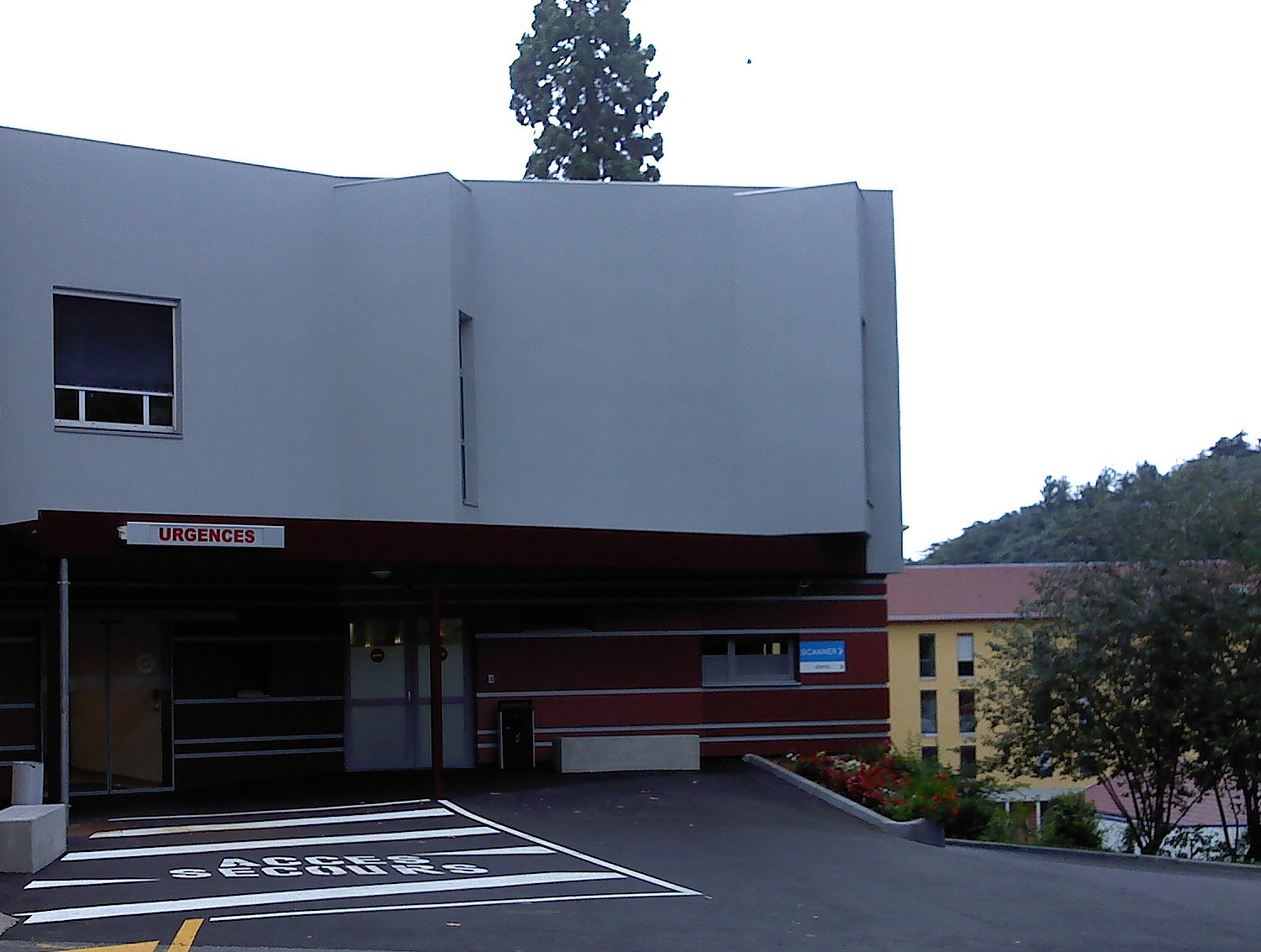 Urgences du centre hospitalier de Tarare 69 L'hôpital nord-ouest